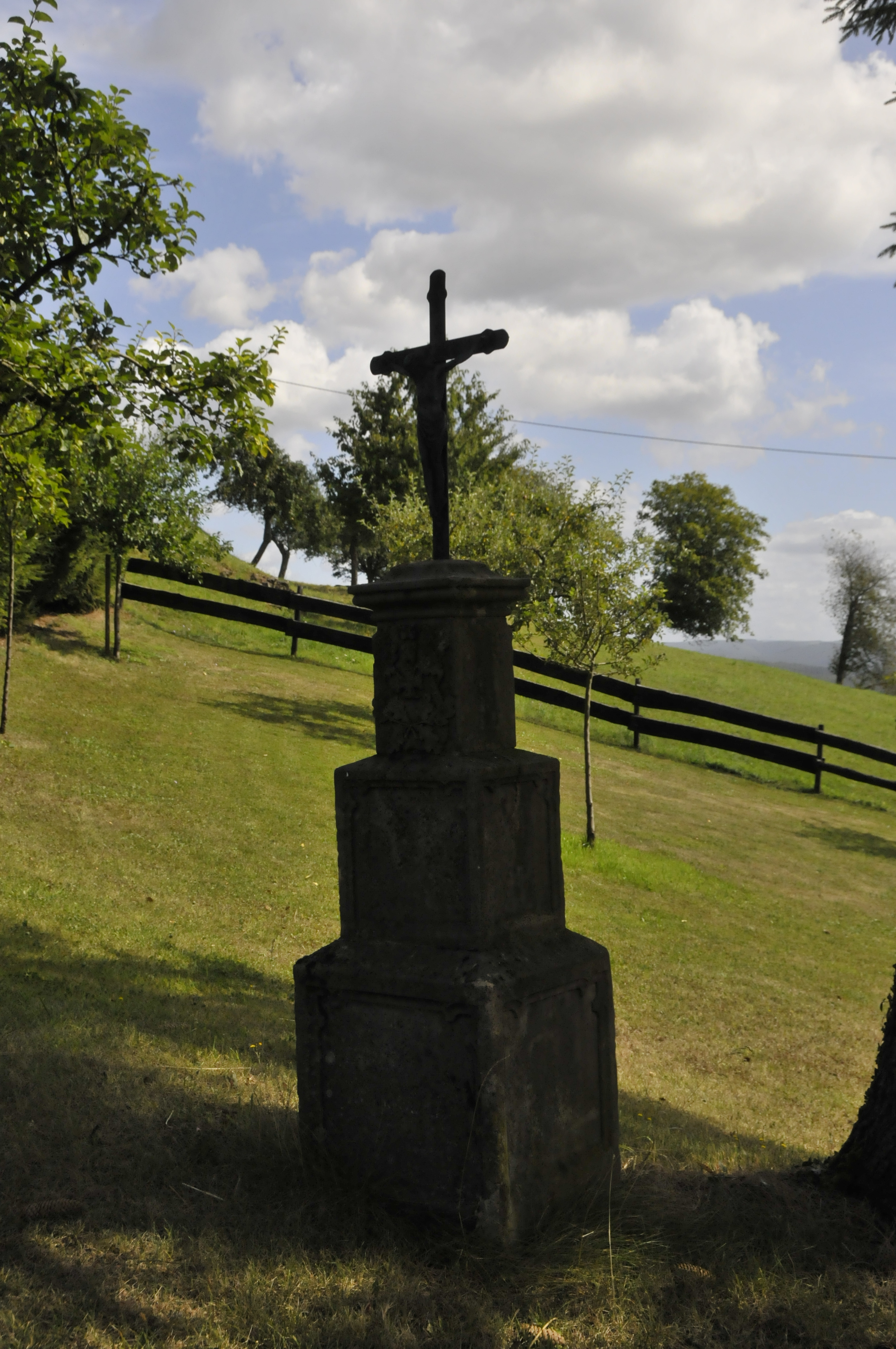 Kelsen, Büchelkreuz